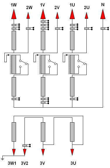 Autotransformator.